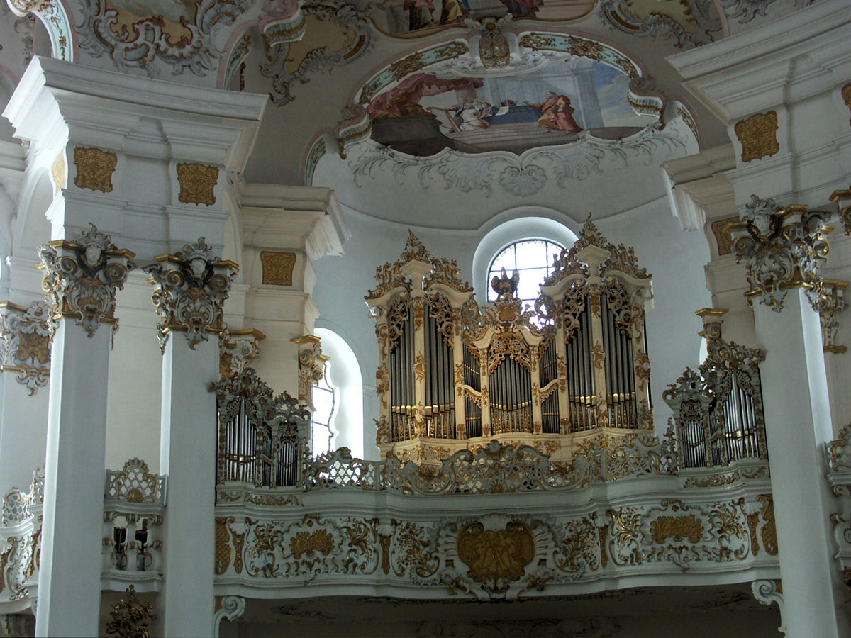 Wies church (Wieskirche), Germany